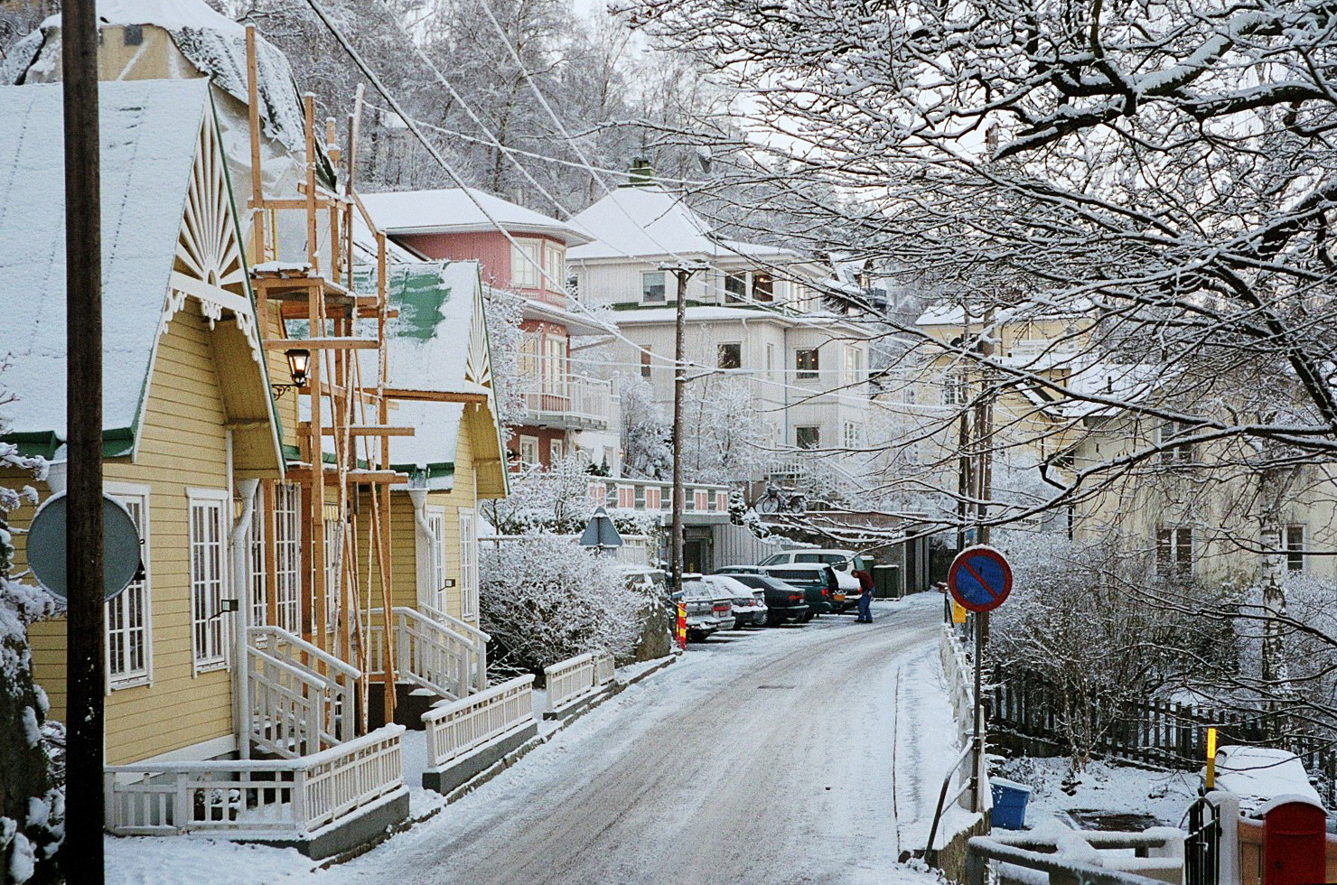 Pettersbergsvägen vid Fridhemsbryggan i Mälarhöjden, Stockholm. Det gula trähuset till vänster var ursprungligen sommarkafé och är numera ombyggt till bostad.